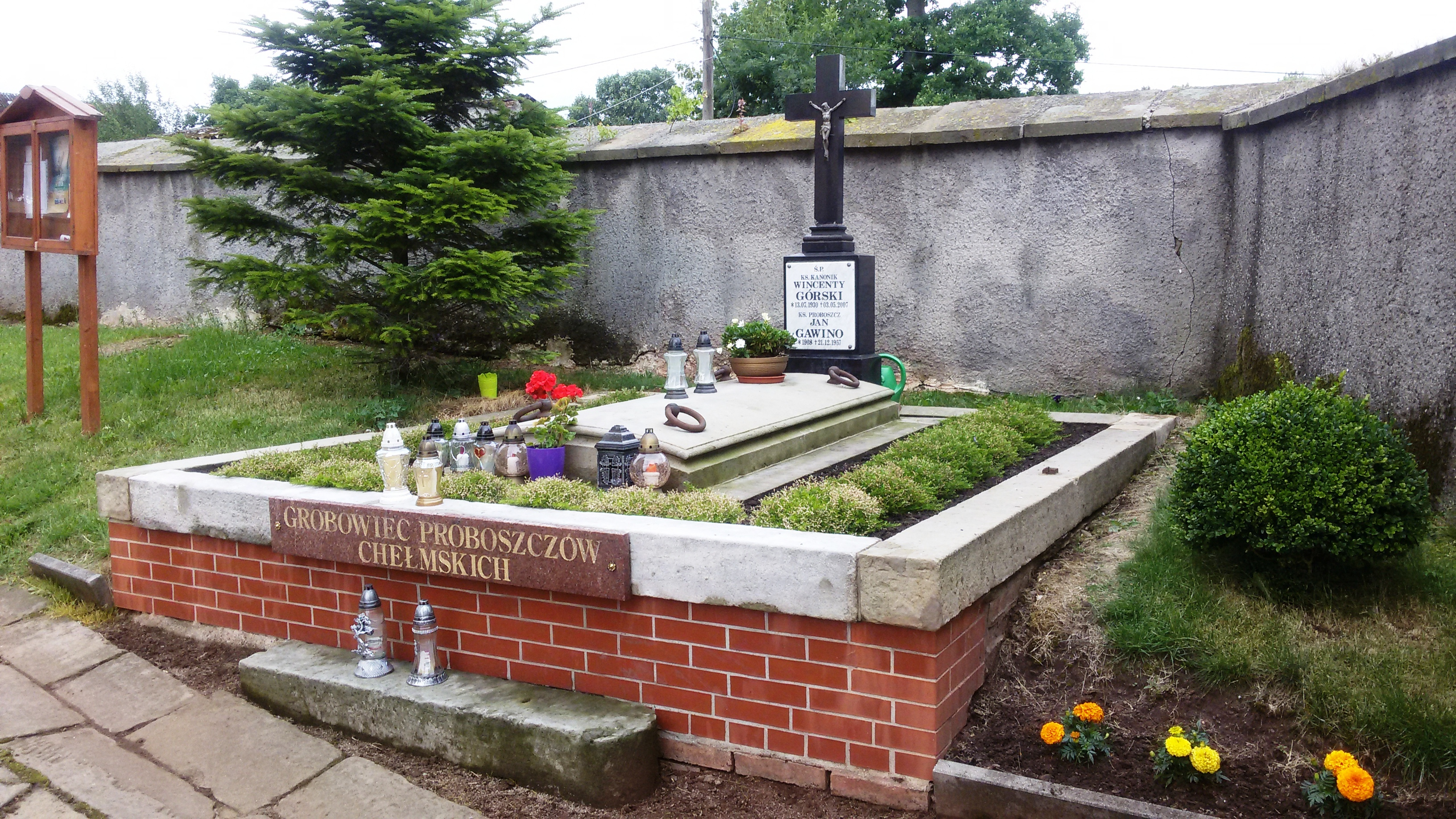 Grobowiec proboszczów w Chełmsku Śl.